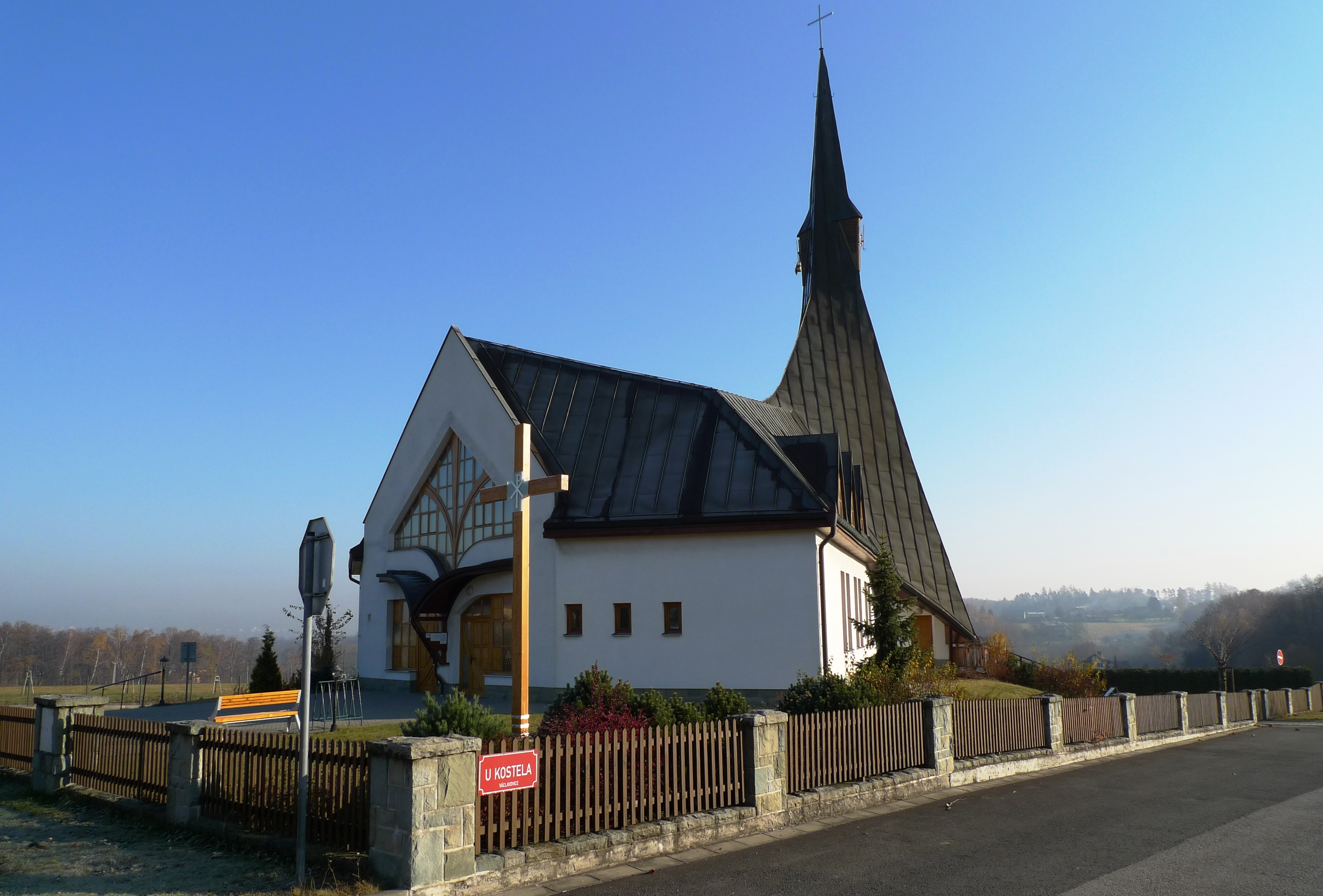 Václavovice - Kostel svatého Václava